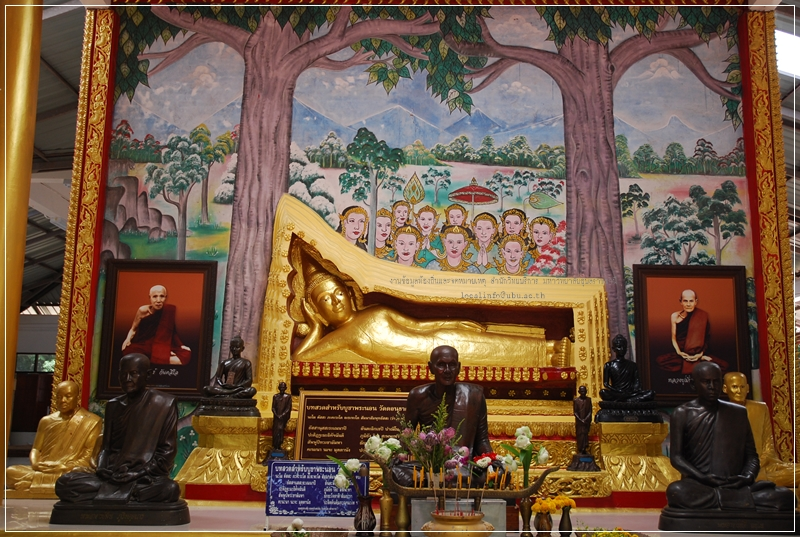 พระนอน วัดดอนธาตุ (เกาะแก้วพระนอนคอนสวรรค์วิเวกพุทธกิจ)